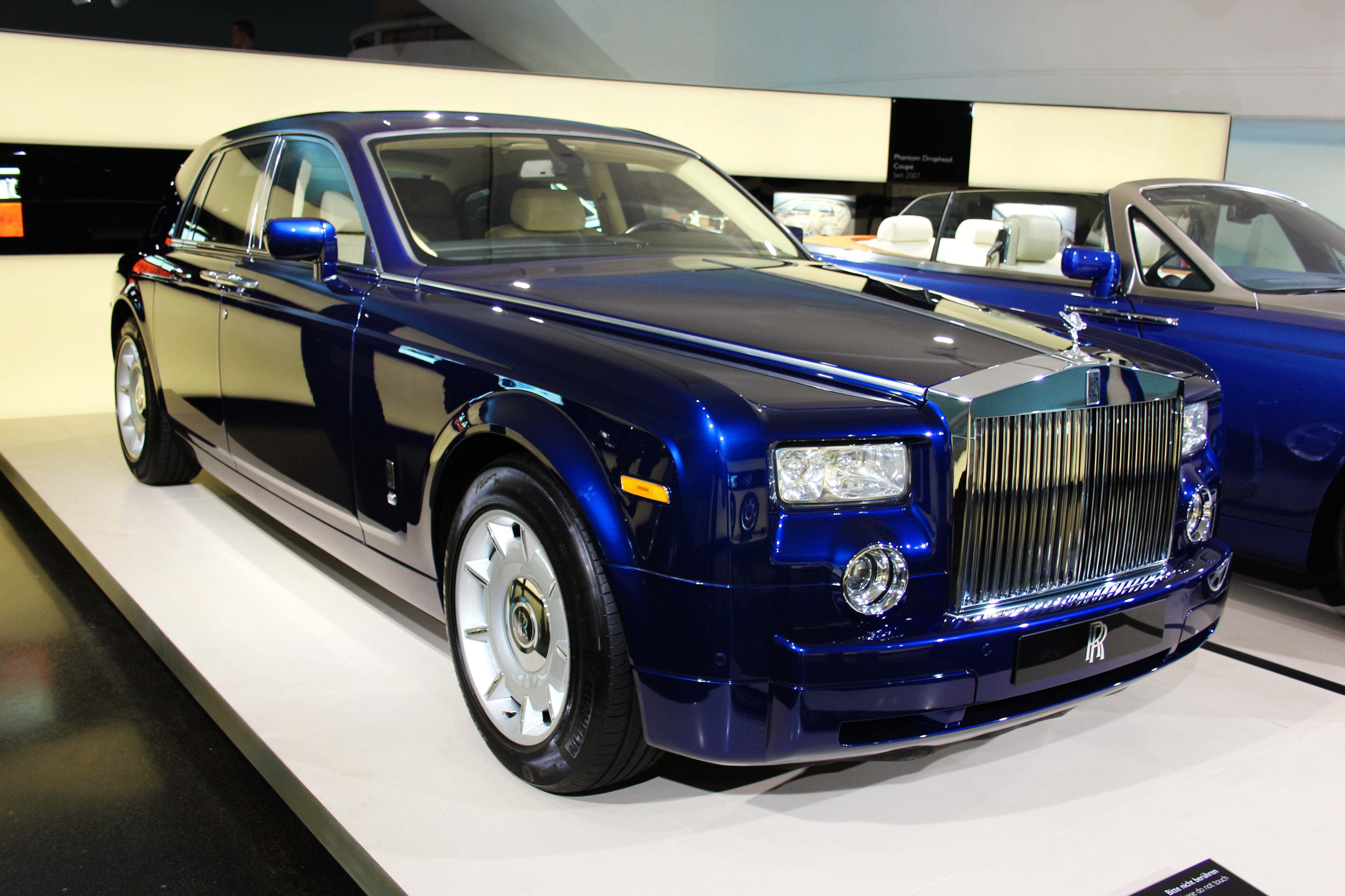 Rolls Royce Phantom Chassis Nr. U121614